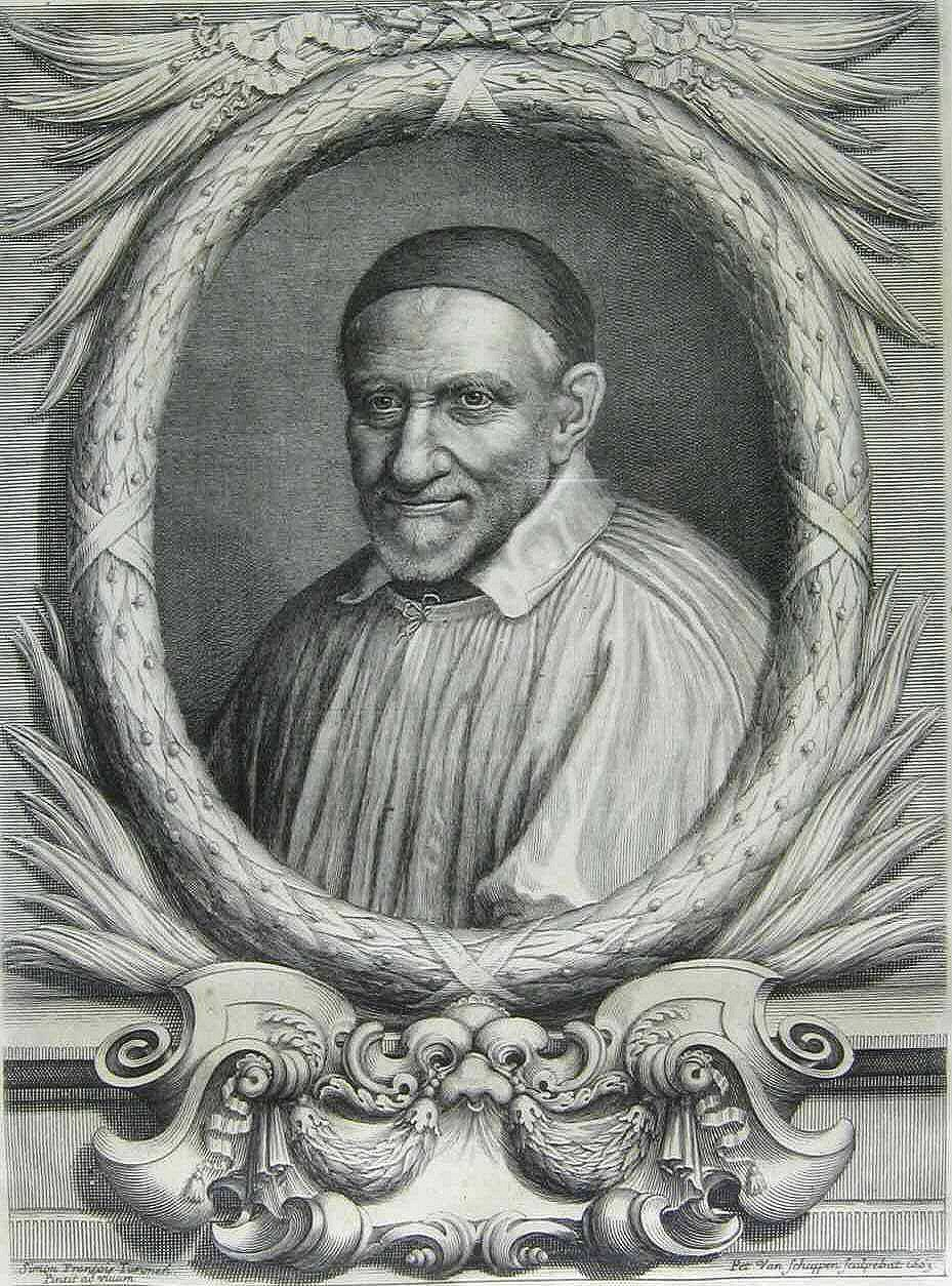 Portrait des Hl. Vinzenz von Paul (1581-1600)